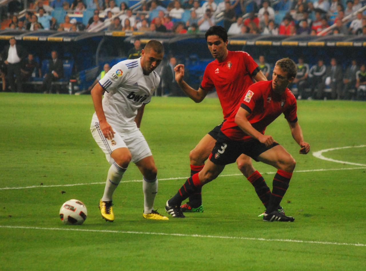 Real Madrid 1 - Osasuna 0 11 de septiembre 2010